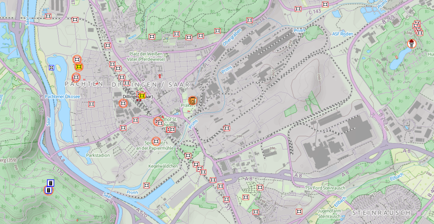 Westwallbunker in Dillingen